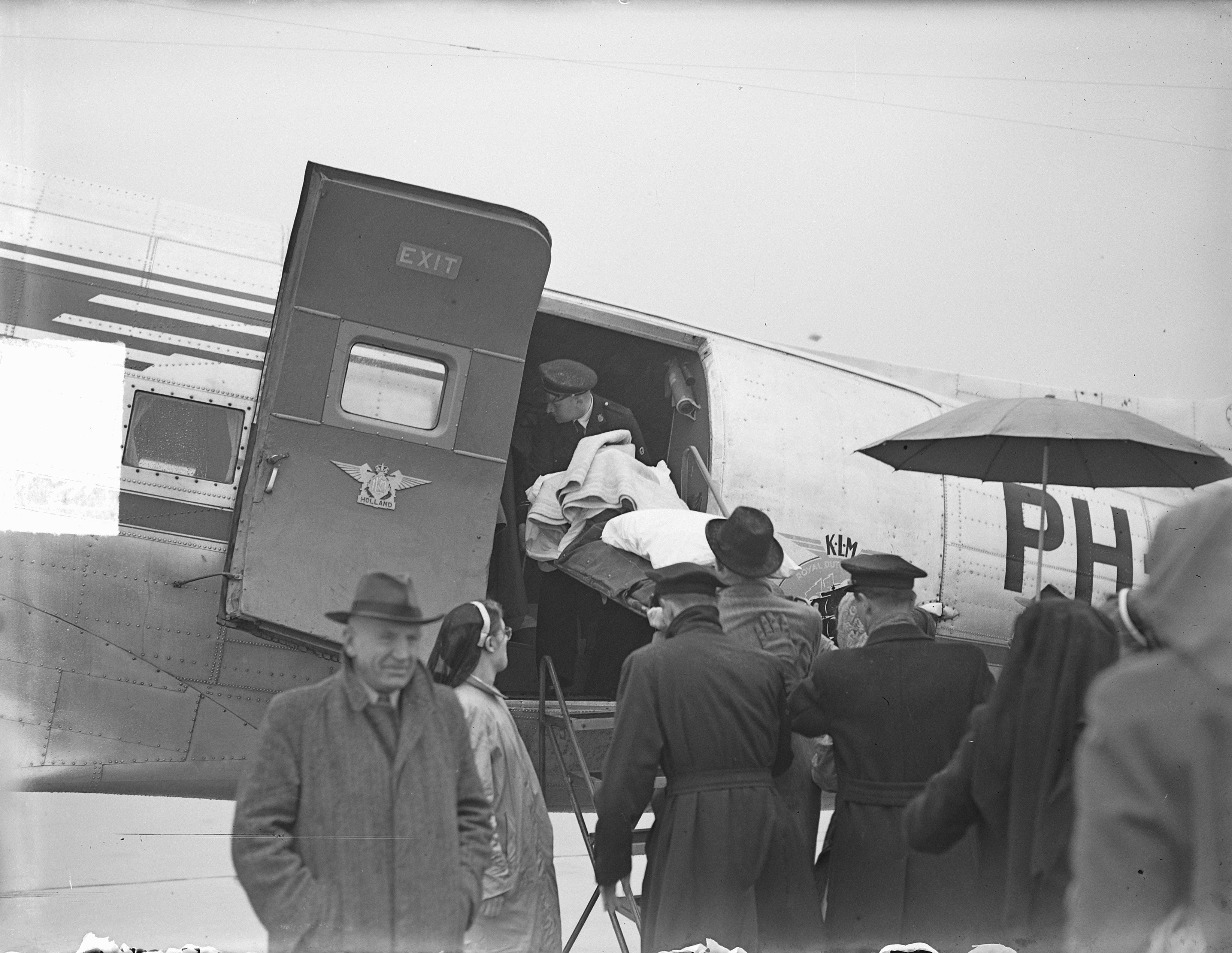 Collectie / Archief : Fotocollectie Anefo Reportage / Serie : [ onbekend ] Beschrijving : Nationale Bedevaart per KLM naar Lourdes Datum : 26 april 1950 Trefwoorden : bedevaarten, vliegtuigen Instellingsnaam : KLM Fotograaf : Nijs, Jac. de / Anefo Auteursrechthebbende : Nationaal Archief Materiaalsoort : Glasnegatief Nummer archiefinventaris : bekijk toegang 2.24.01.09 Bestanddeelnummer : 903-9300